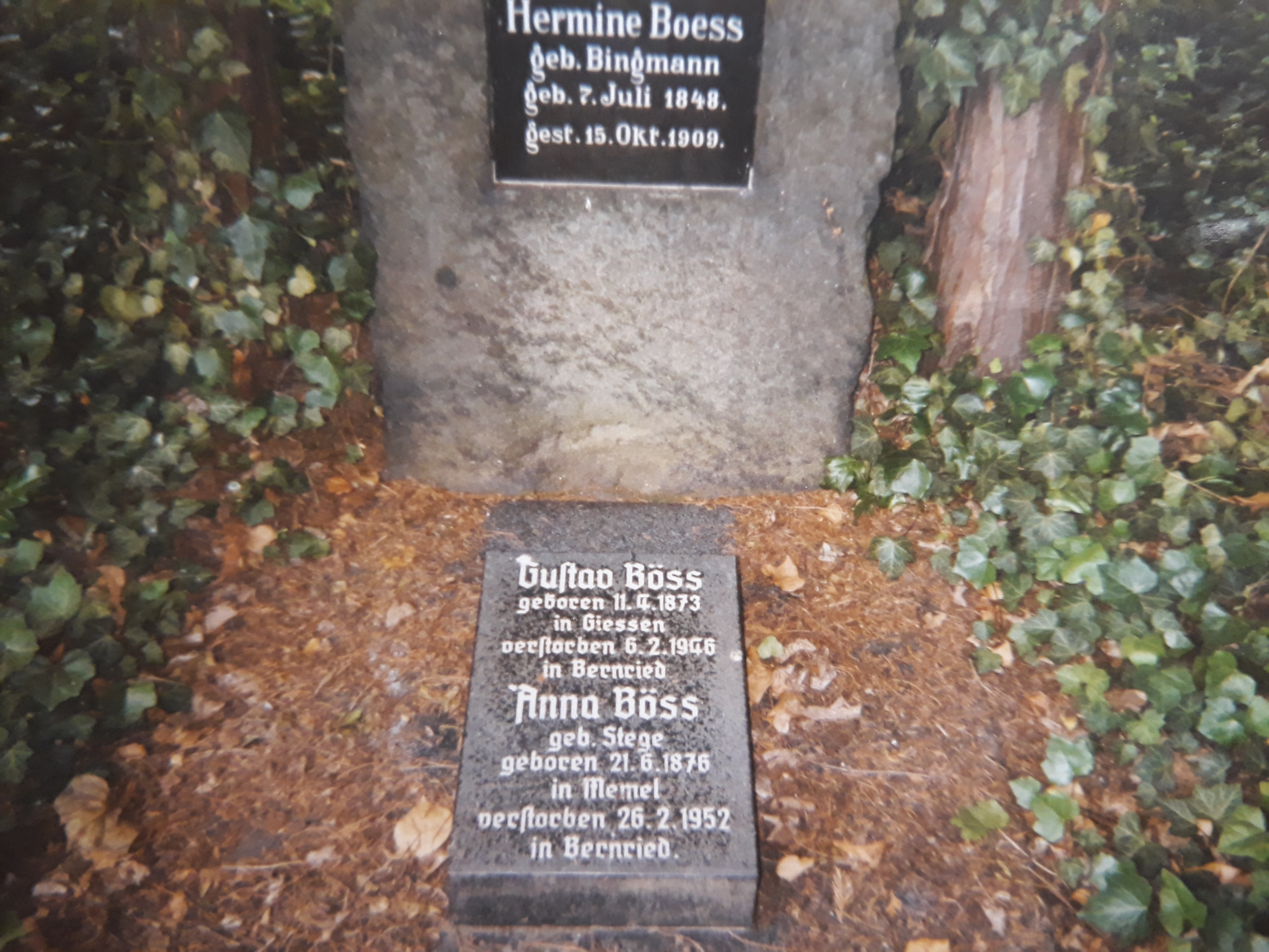 Das Grab des Berliner Oberbürgermeisters Gustav Böß und seiner Frau Anna im Grab seiner Eltern auf dem Alten Friedhof in Gießen.